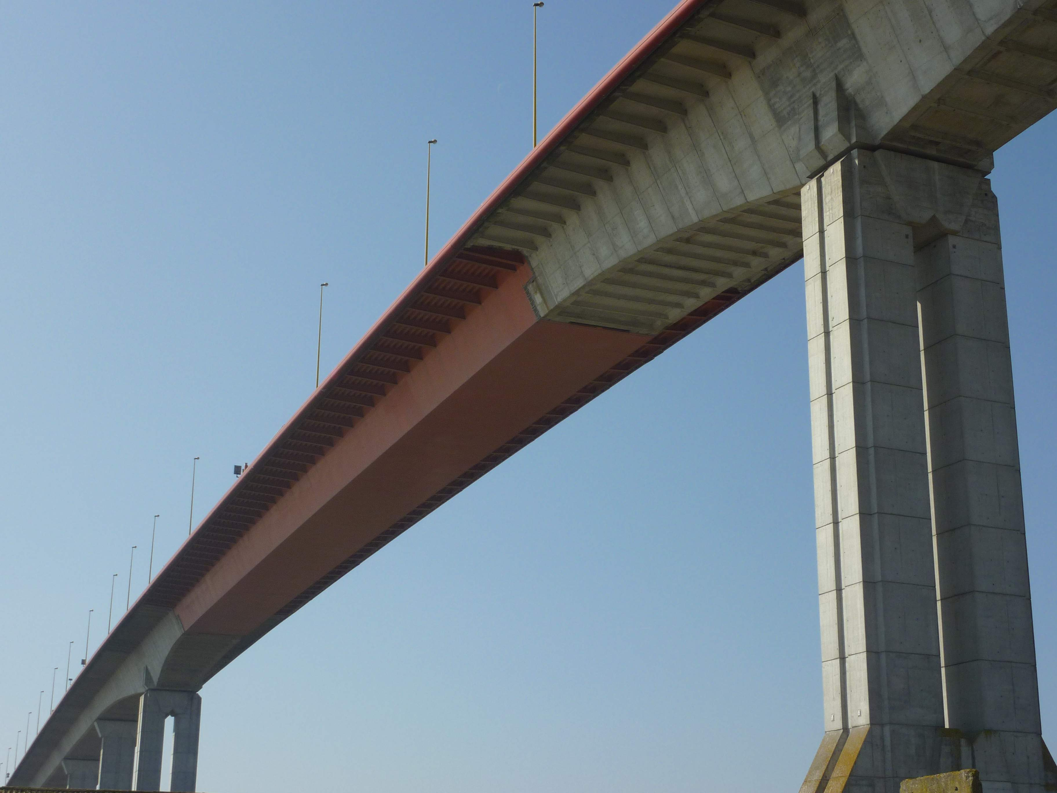 Pont de Cheviré à Nantes (France), poutre caisson à dalle orthotrope